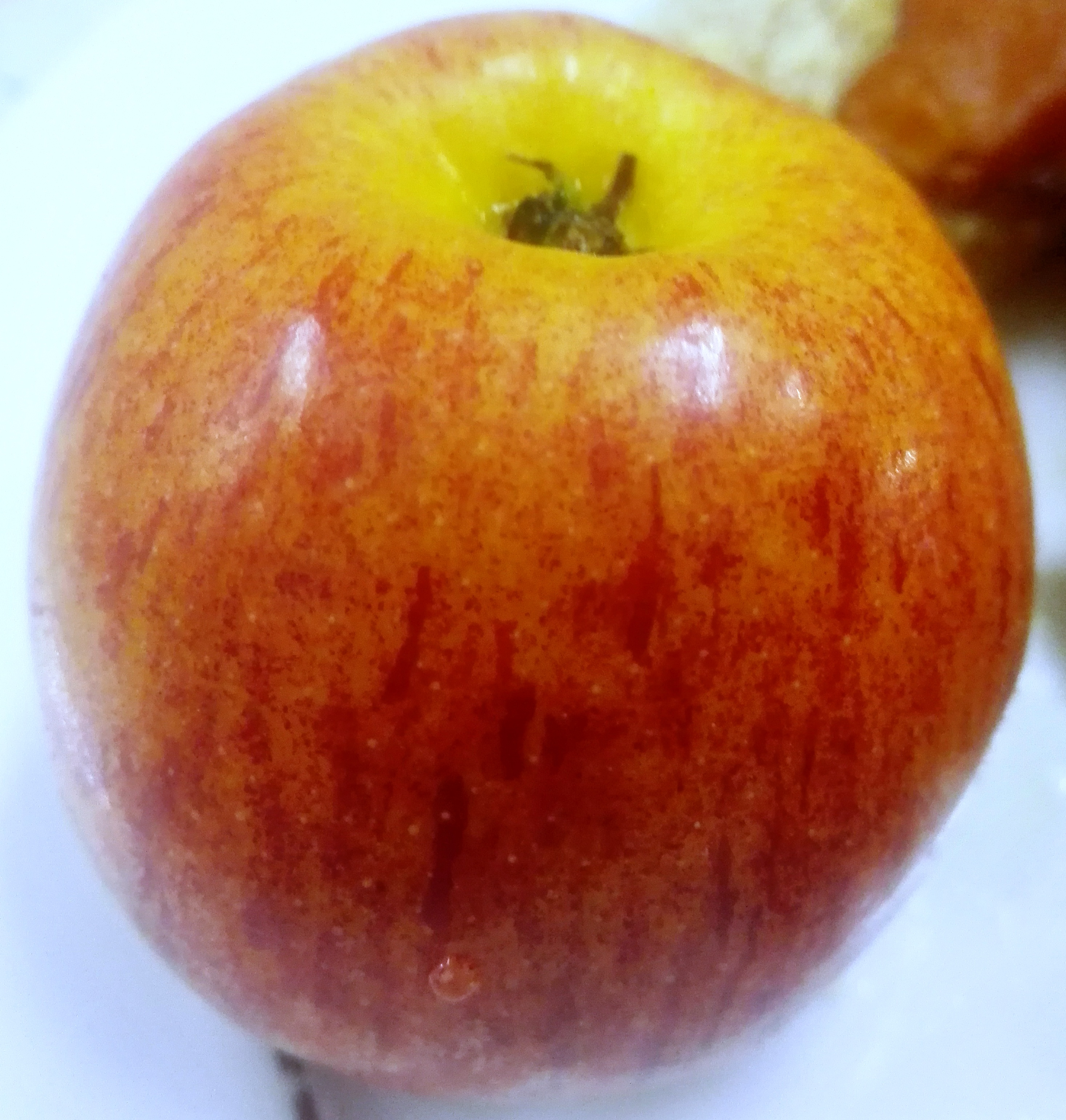 apple